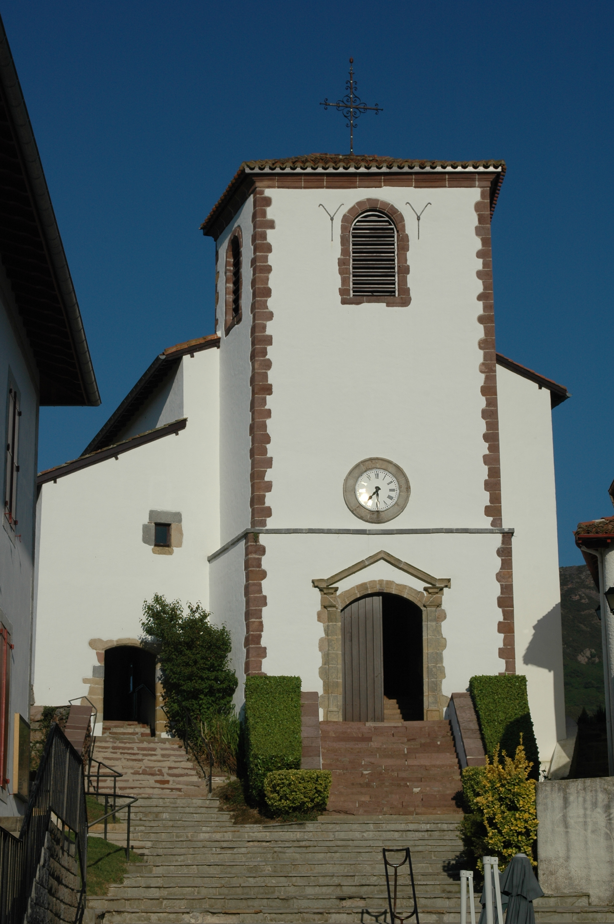 Biriatuko San Martin eliza